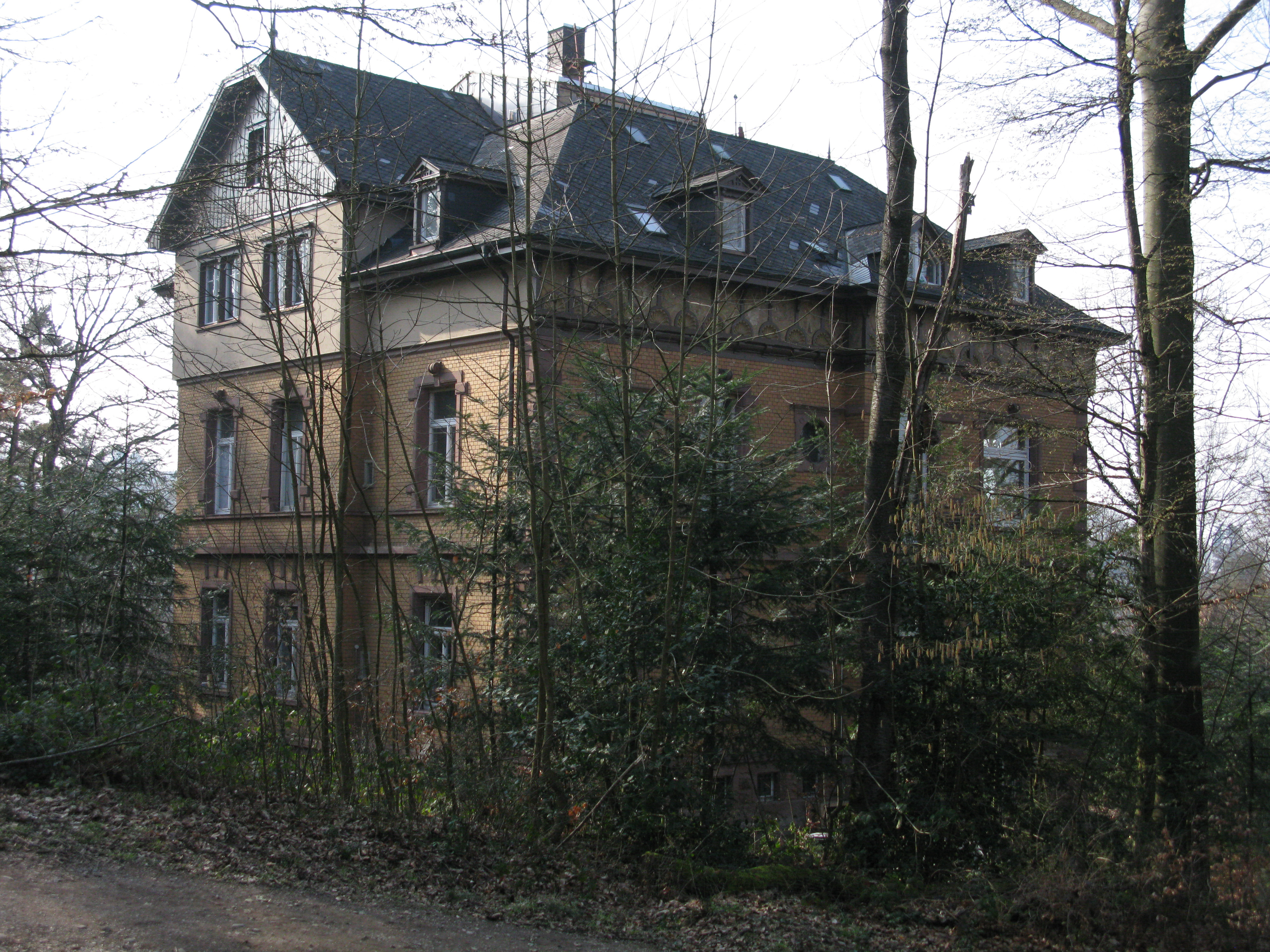 Villa Mitscherlich in Freiburg-Wiehre, 1890 für den Chemiker, Erfinder und Fabrikanten Alexander Mitscherlich (1836–1918) errichtet und bis 1978 vom Max-Planck-Institut genutzt, dient sie 2019 19 bildenden Künstlerinnen und Künstlern als Atelierhaus.